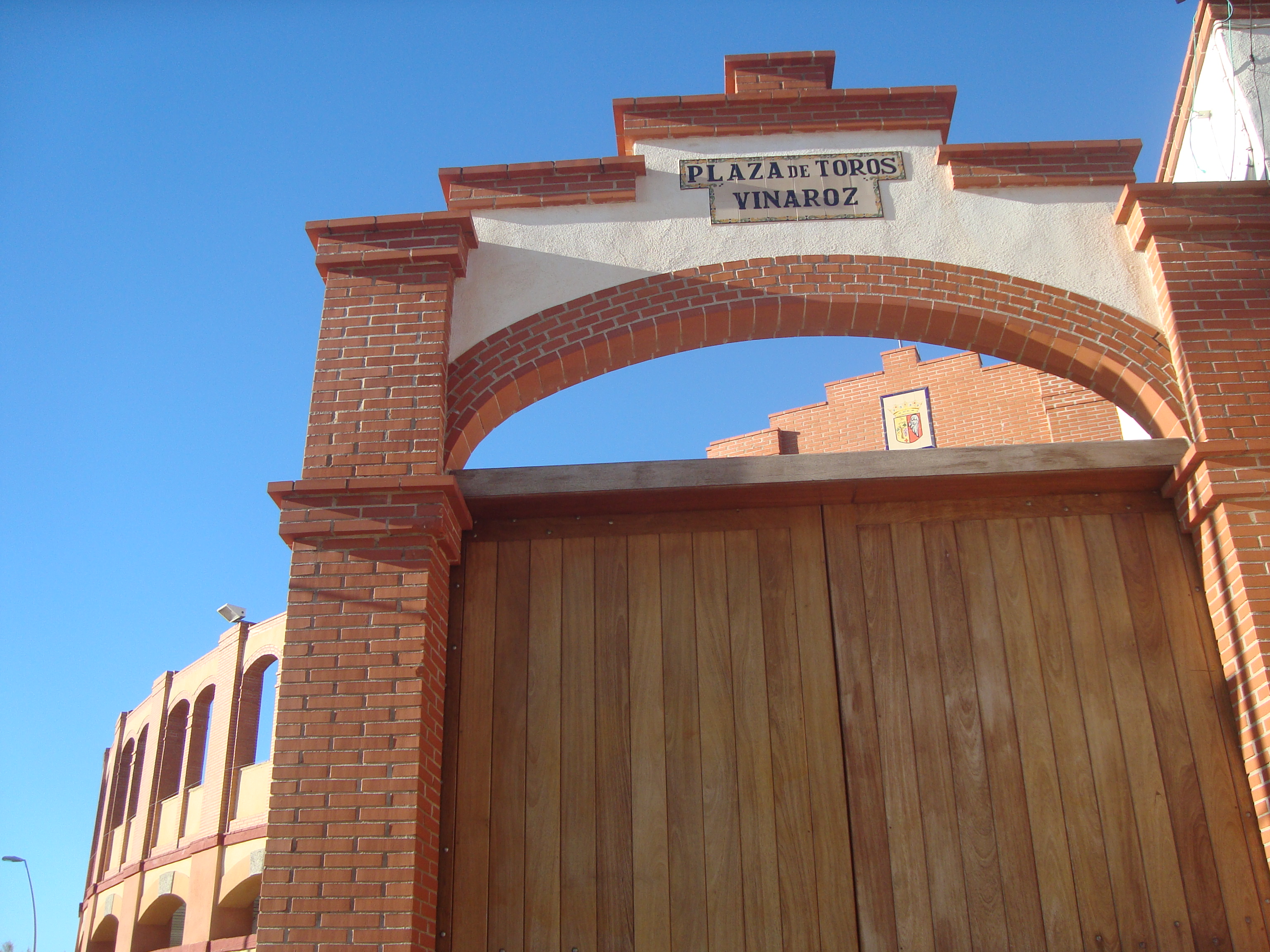 Plaça de Bous (Vinaròs) 03.138-017.